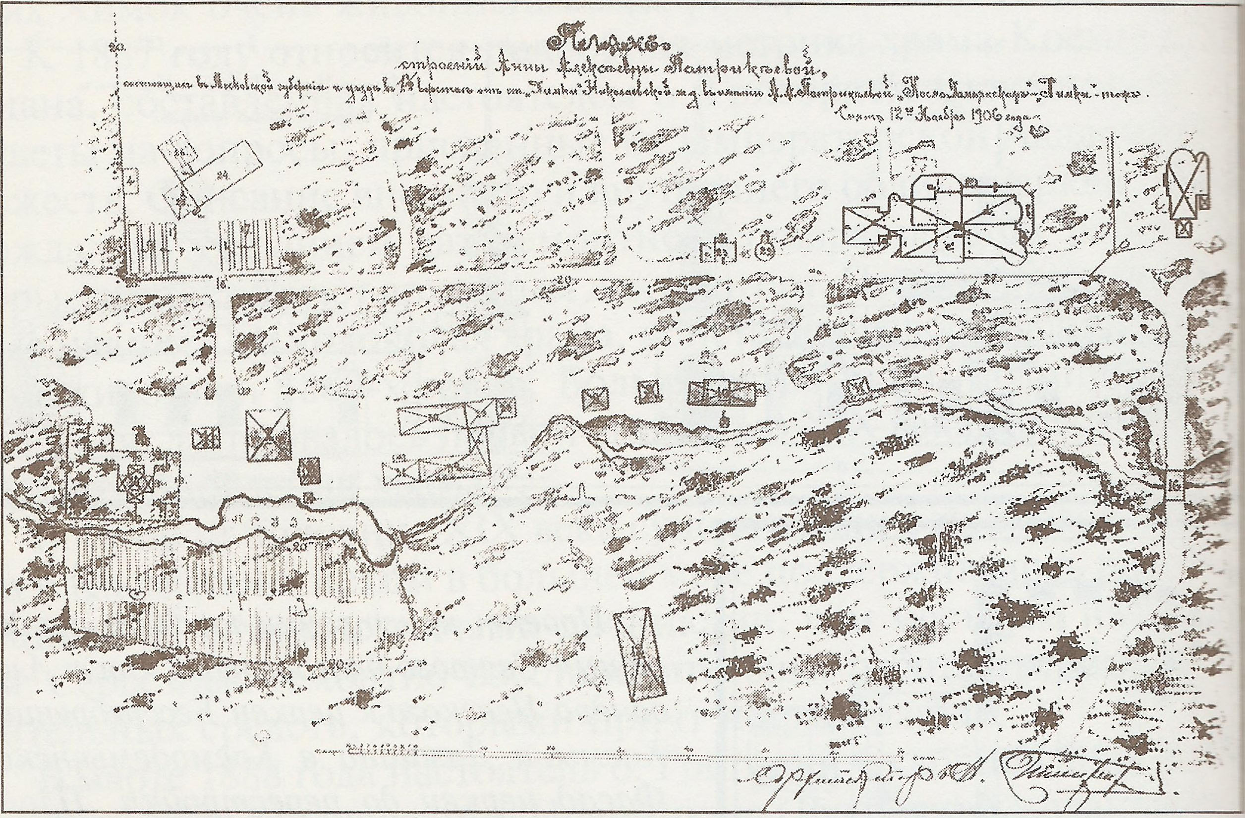 План усадьбы Патрикеевых "Космодемьянское"